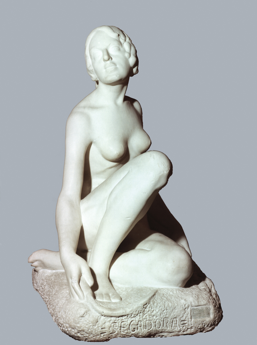 Obra del escultor Antonio Ros Lopez, es propiedad de La Comunidad Autónoma de Murcia. Data de 1924